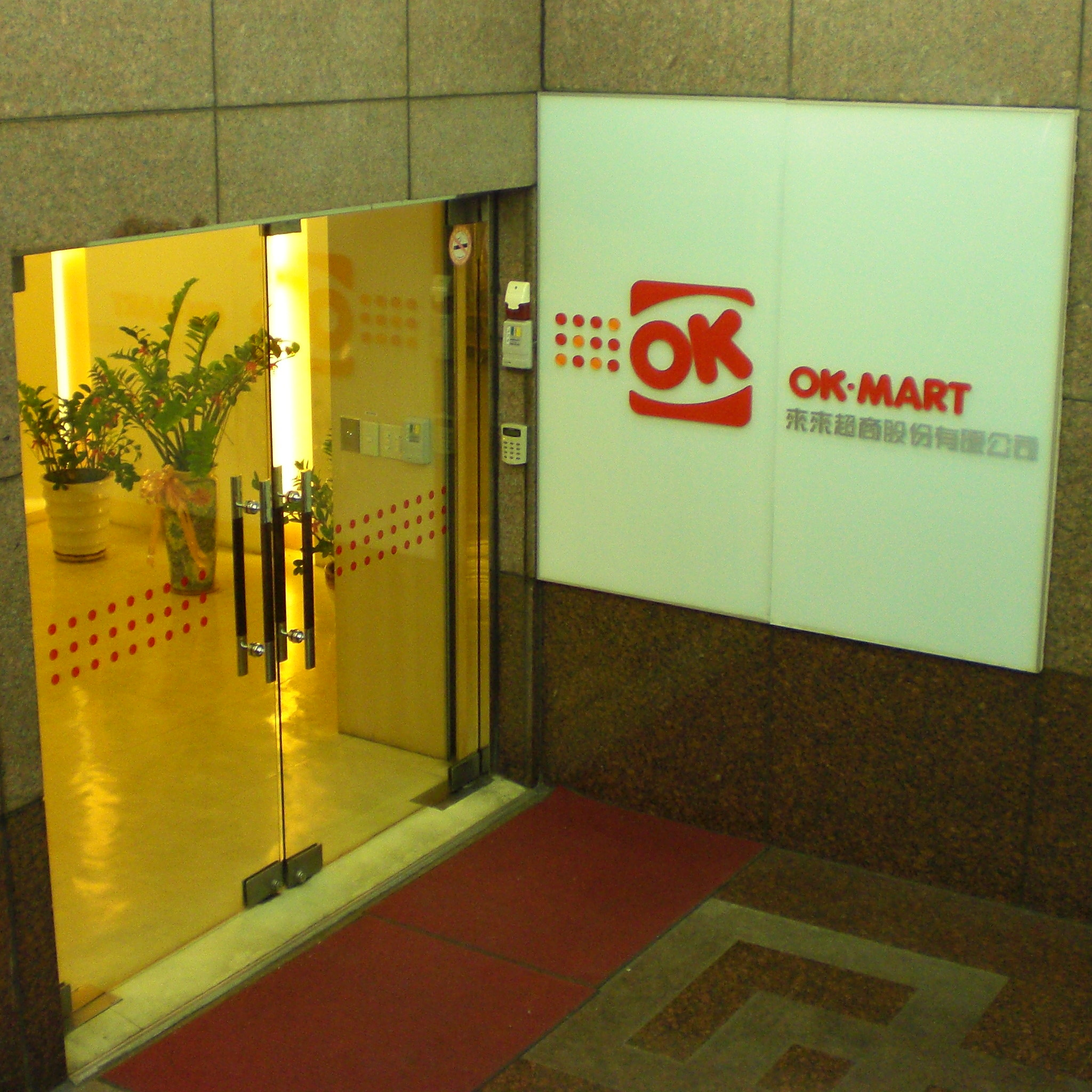 中文（台灣）: 來來超商總部，地址：臺北市信義區松德路97號地下一樓。